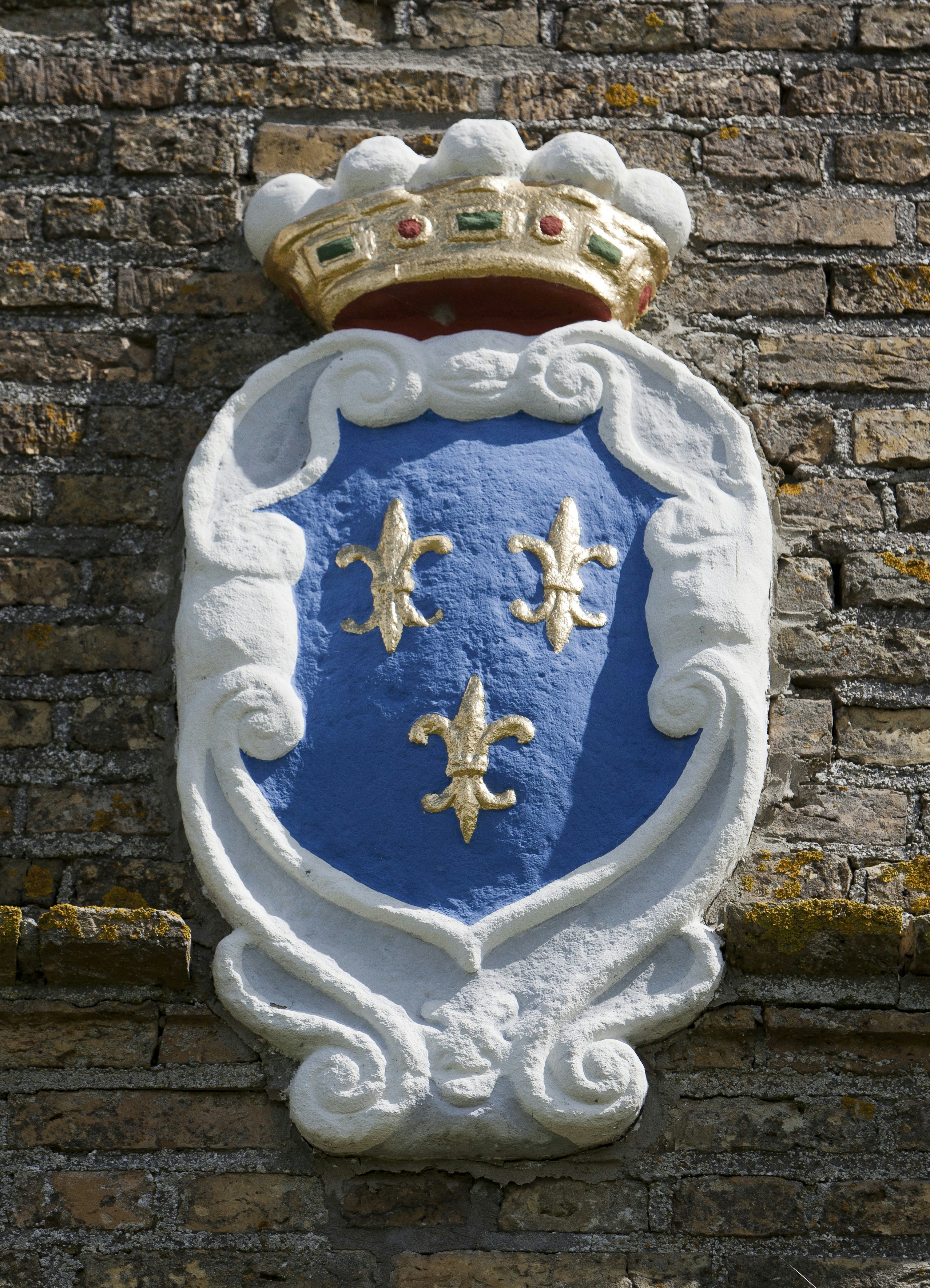 Uniastate: Gevelsteen boven de doorgang, aan de achtergevel van het poortgebouw met wapensteen met het wapen van de familie Meynsma